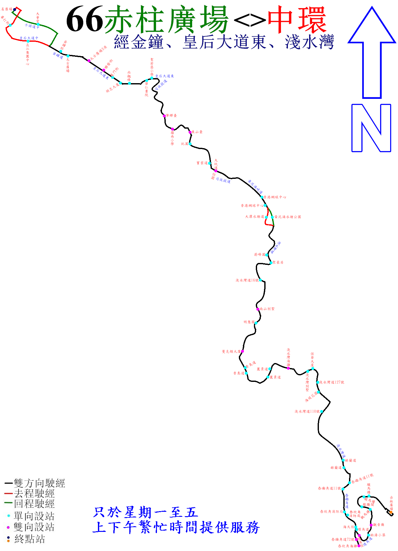 中文（香港）: 新巴66線的走線圖